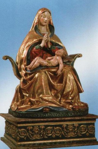 Madonna della Misericordia